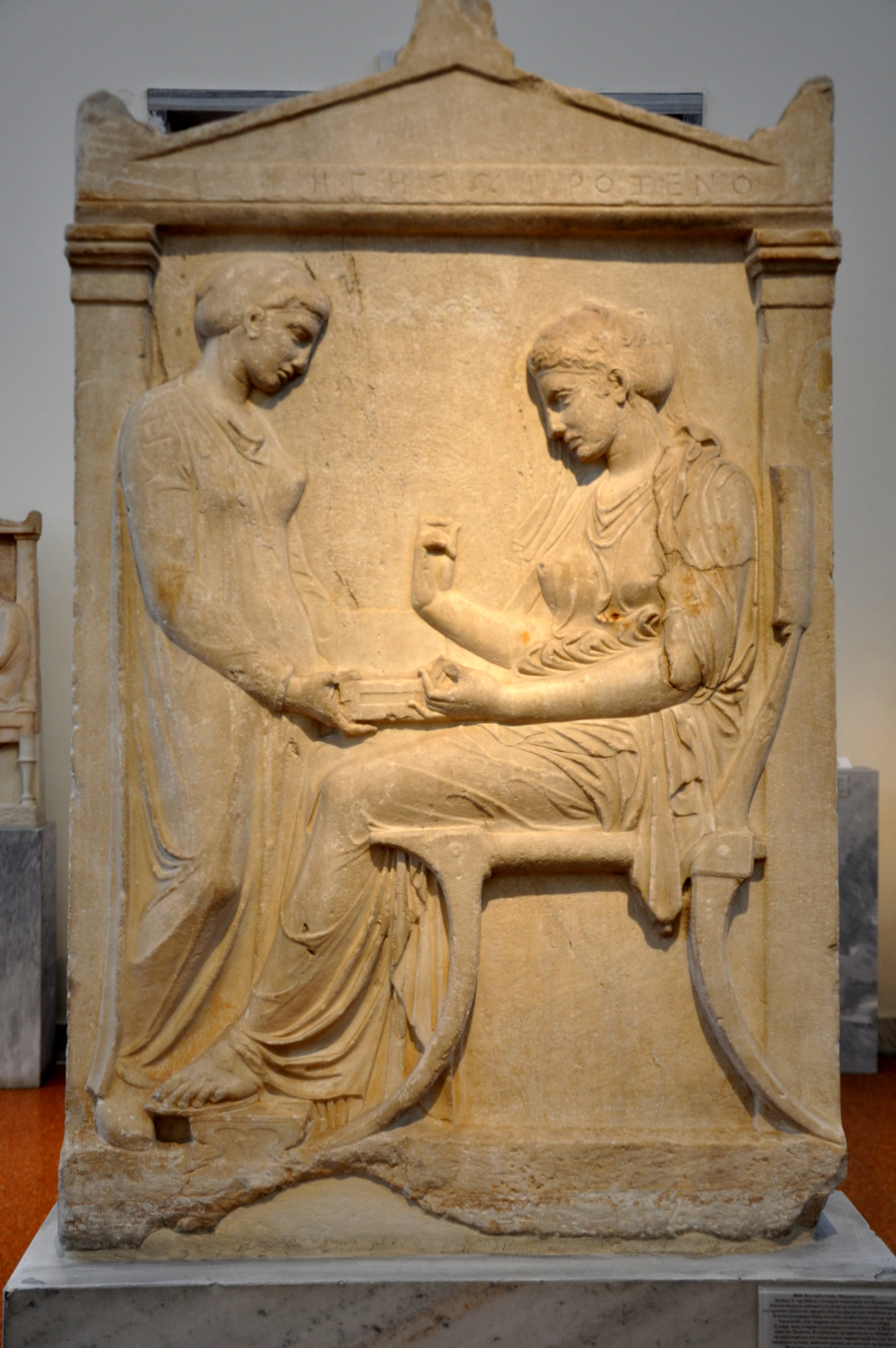 Stella Hegeso Prokseno, z nekropolii Kerameikos - oryginał, eksponowany w Narodowym Muzeum Archeologicznym w Atenach